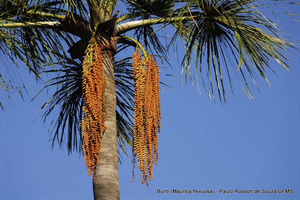 Cacho de flores masculinas de Mauritia flexuosa